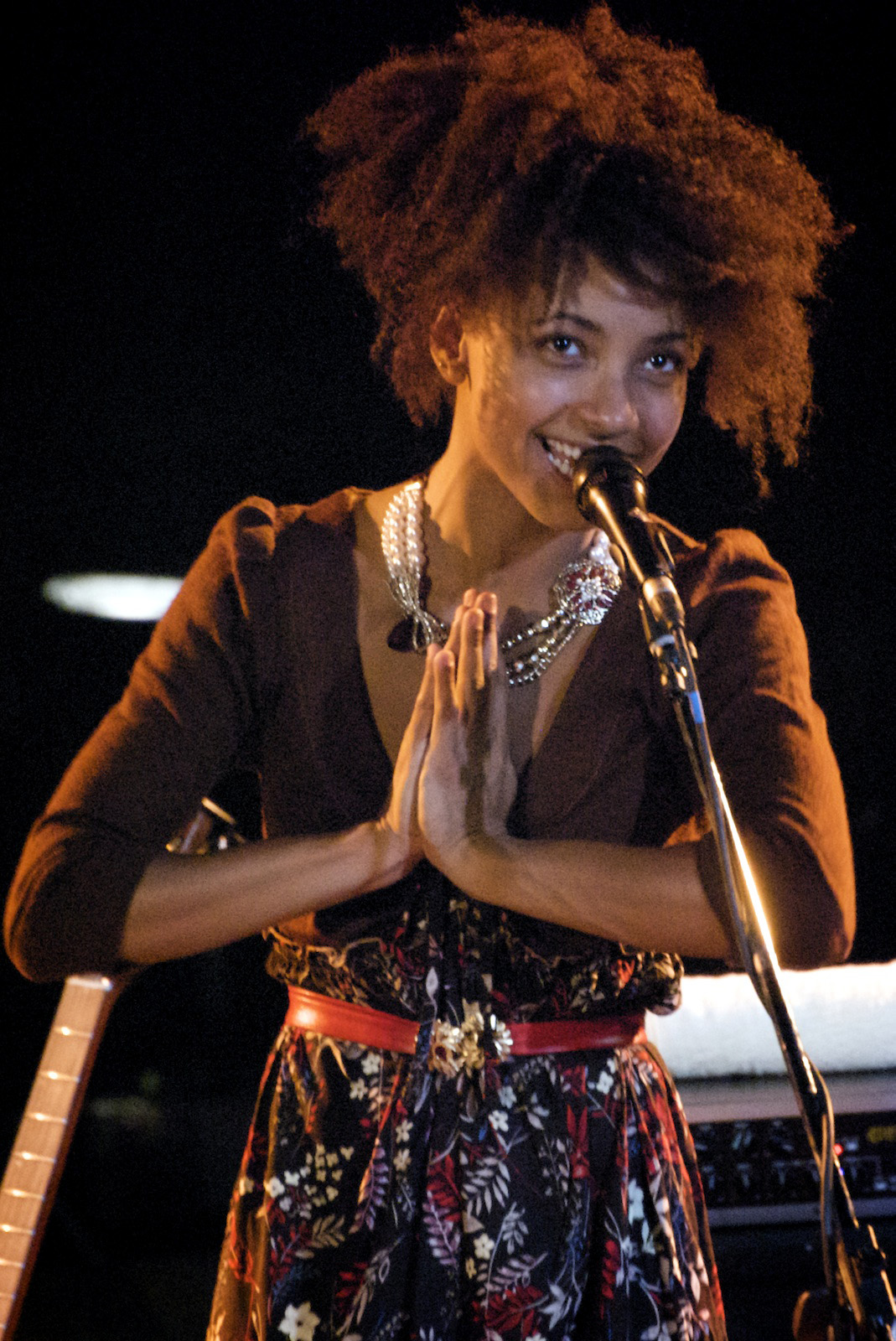 Esperanza Spalding - Concerto del 15 luglio 2009 a Fiesole - Firenze